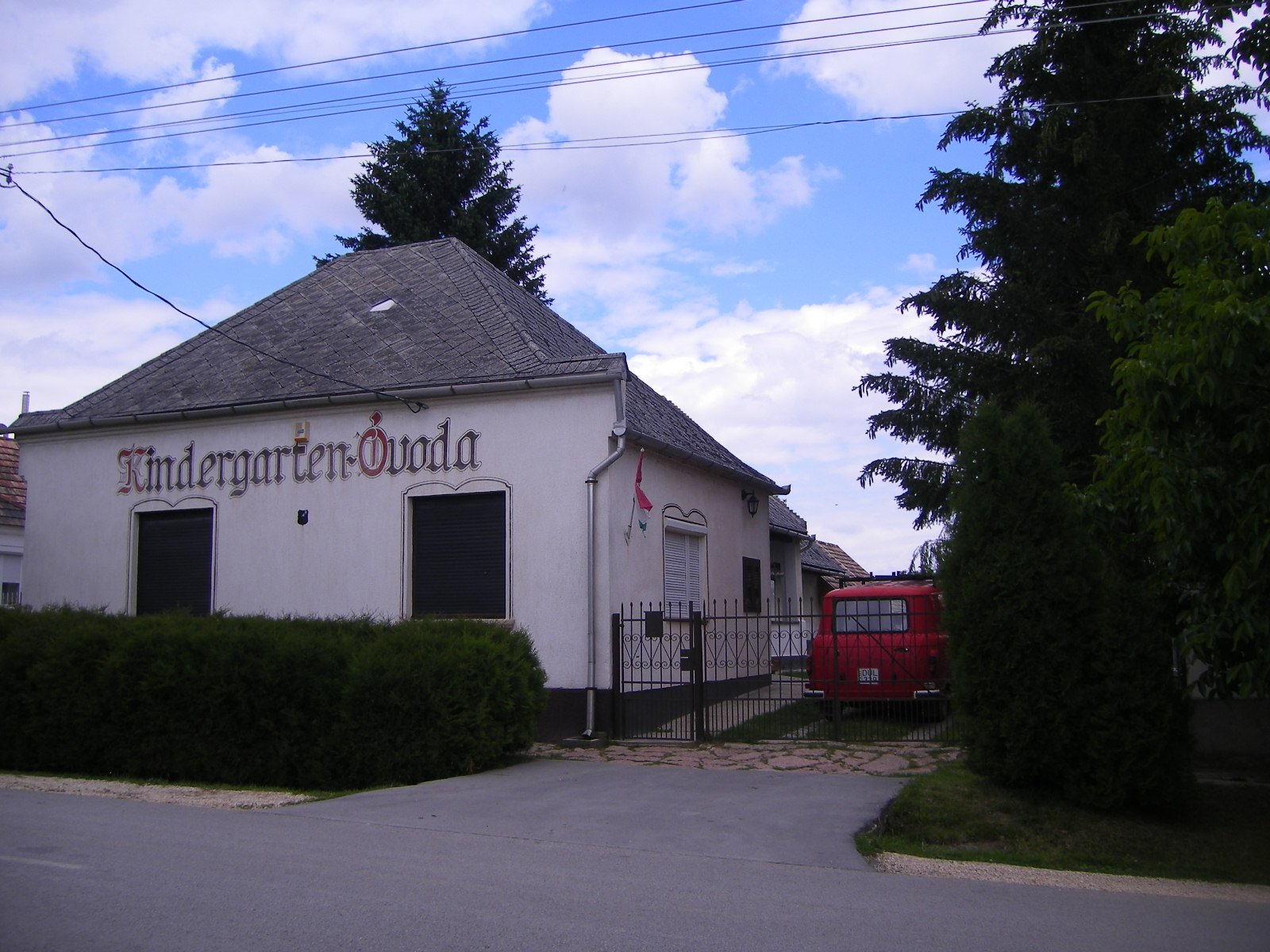 Vértestolna - óvoda